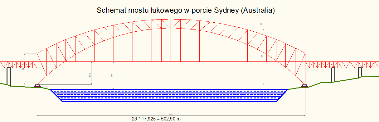 Schemat mostu łukowego w porcie Sydney (Australia)